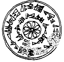 Печать_SBo_I.86. Alluwamna